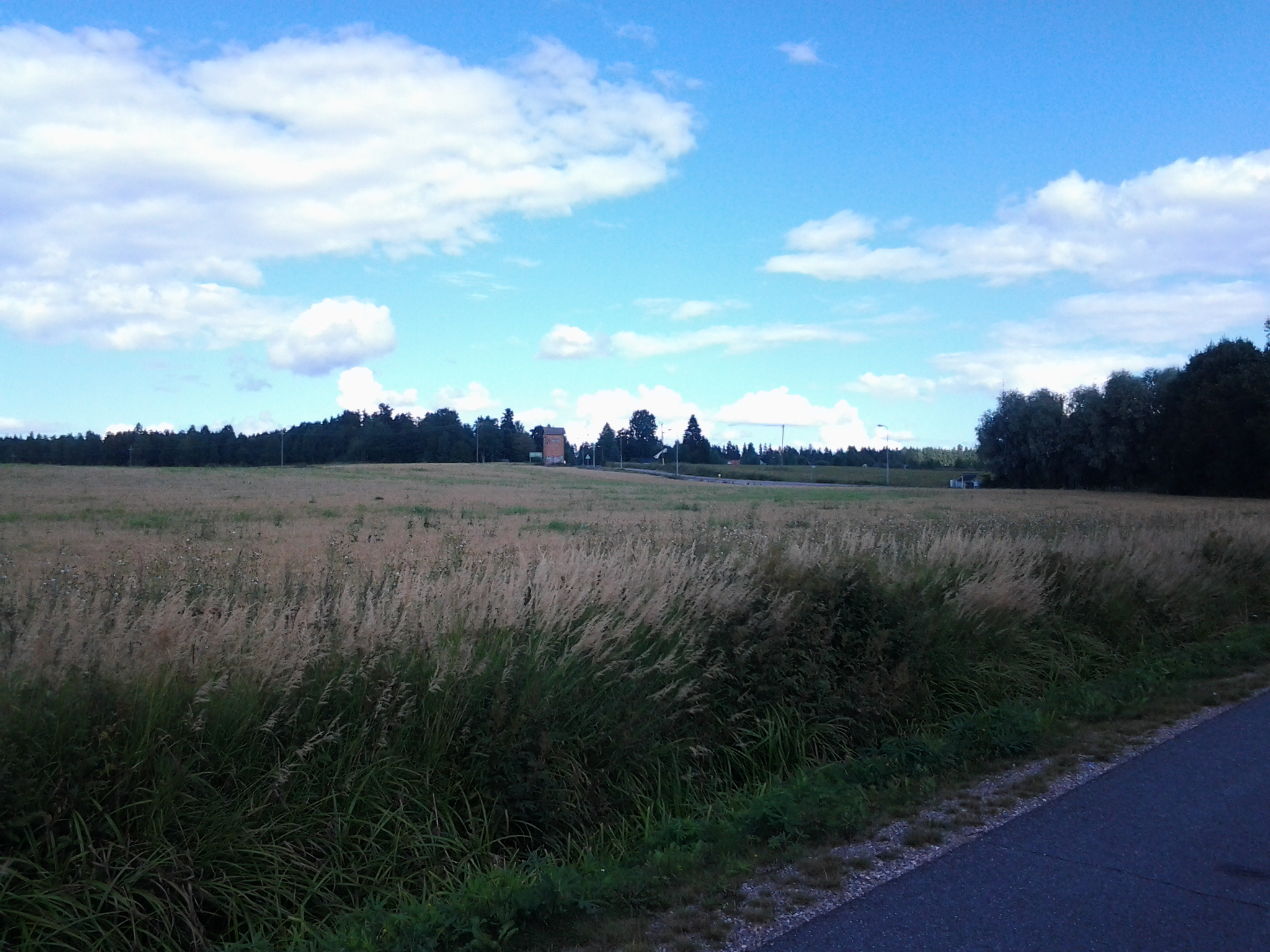 Peltoa ja muuntaja Vesalassa, Hollolassa.